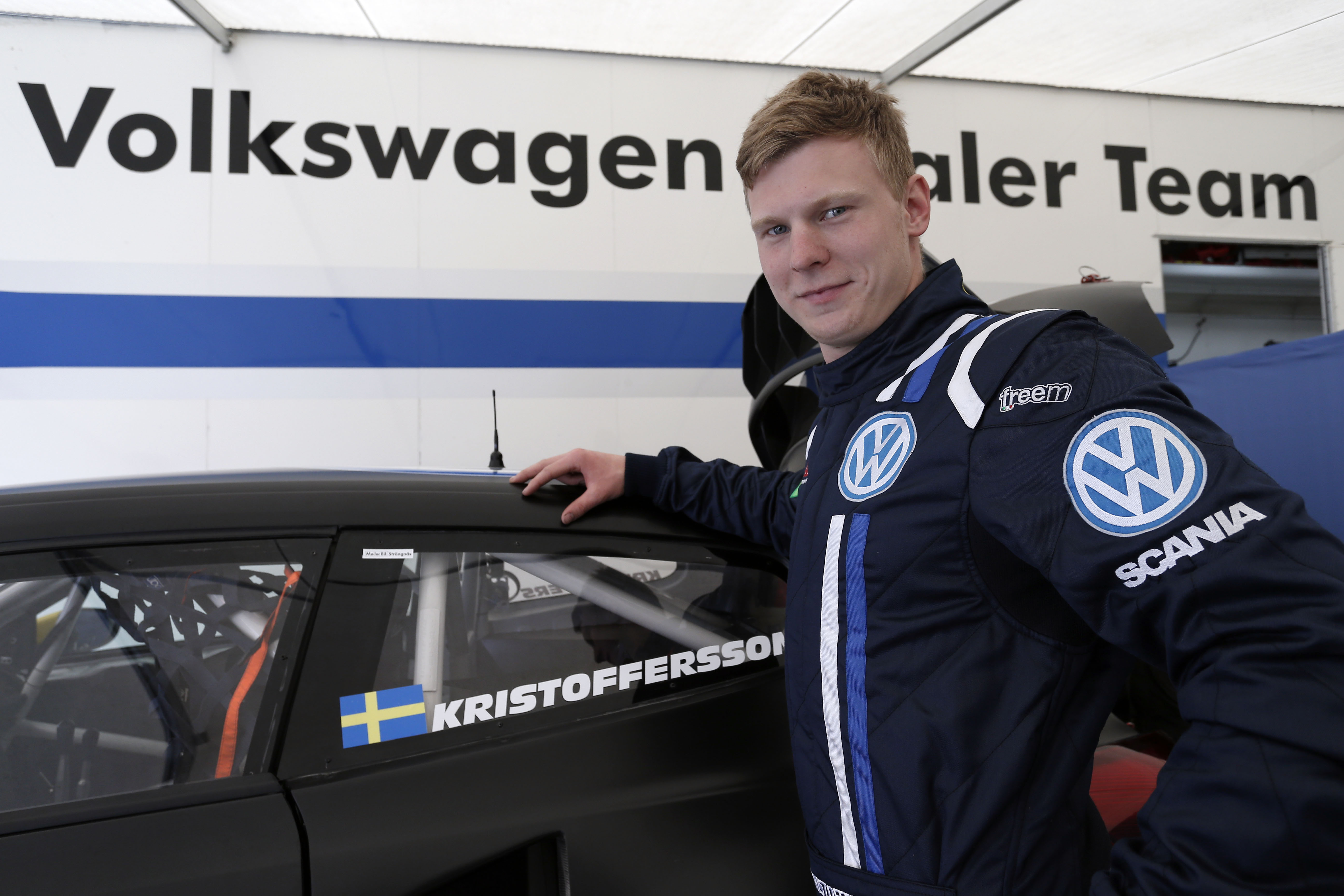 Johan Kristoffersson Rallycross SM Strängnäs 2013-05-11.